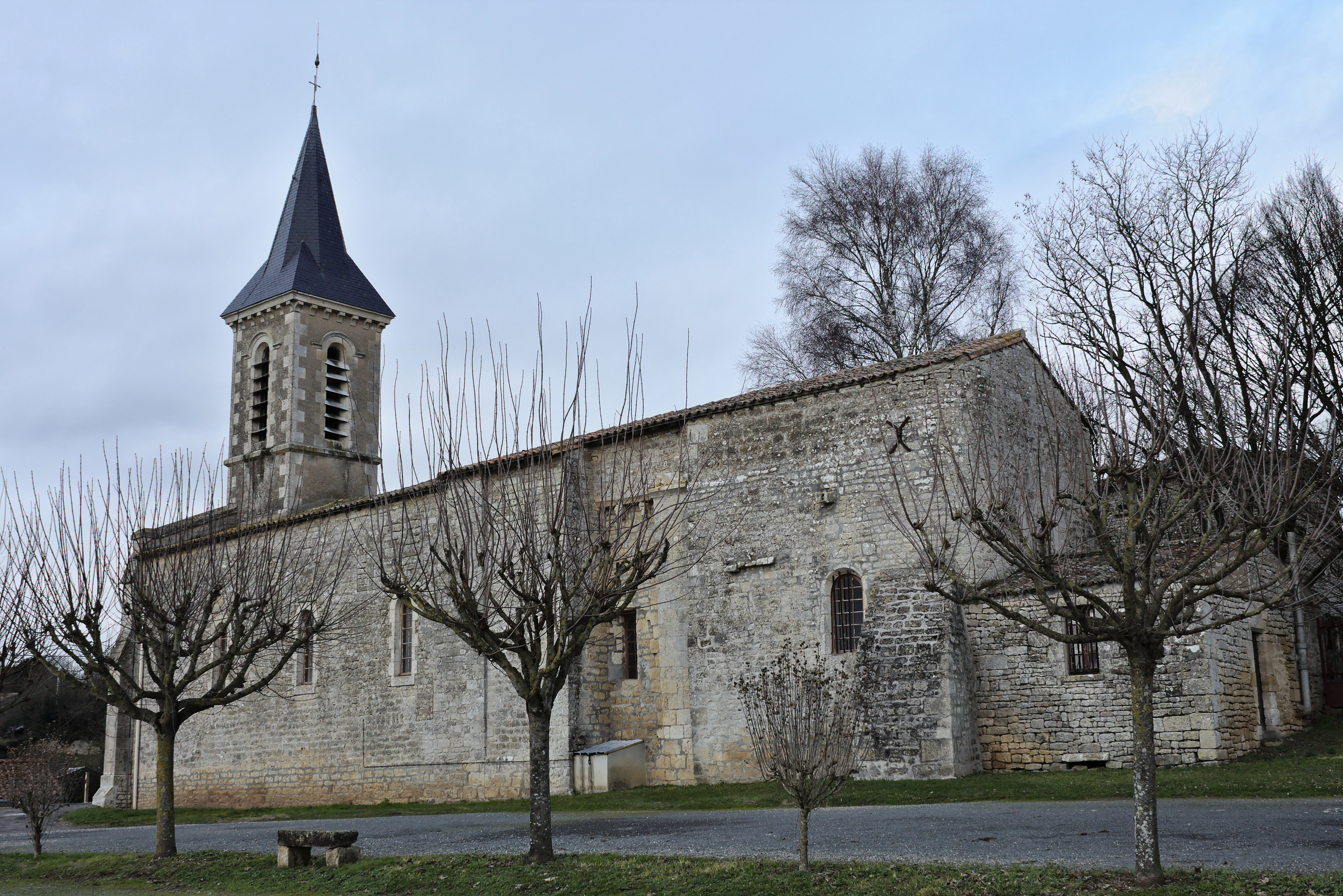 Église de Lusseray